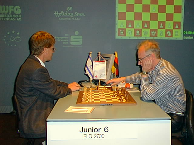 Matthias Wüllenweber (links) mit dem Schachprogramm Junior 6, dem Gegner von Robert Hübner (rechts), Dortmunder Schachtage 2000 im Dortmunder Schauspielhaus.